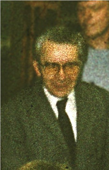 Portrait